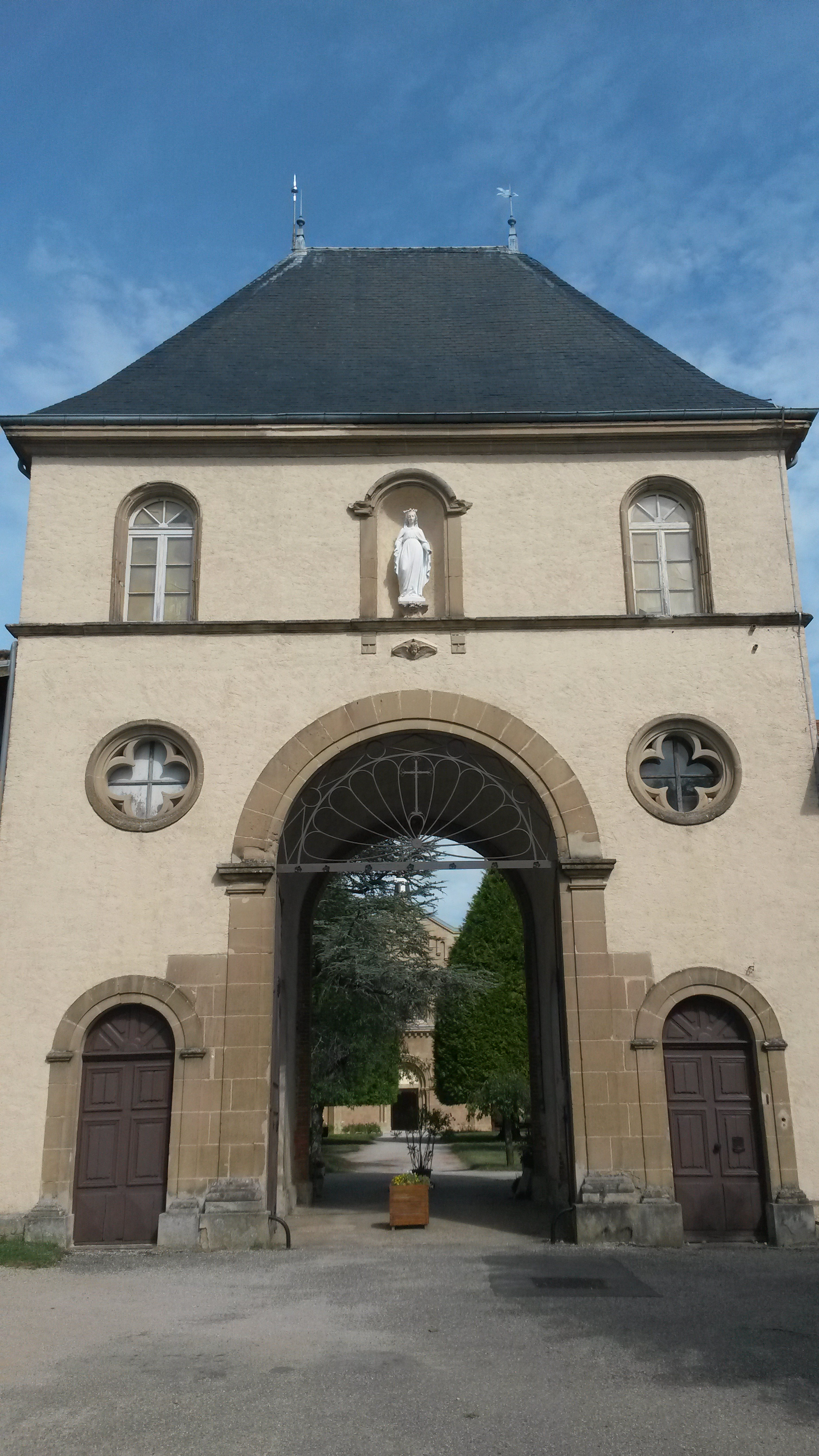 Porche d'entrée de l'abbaye de Chambarand, Isère, France